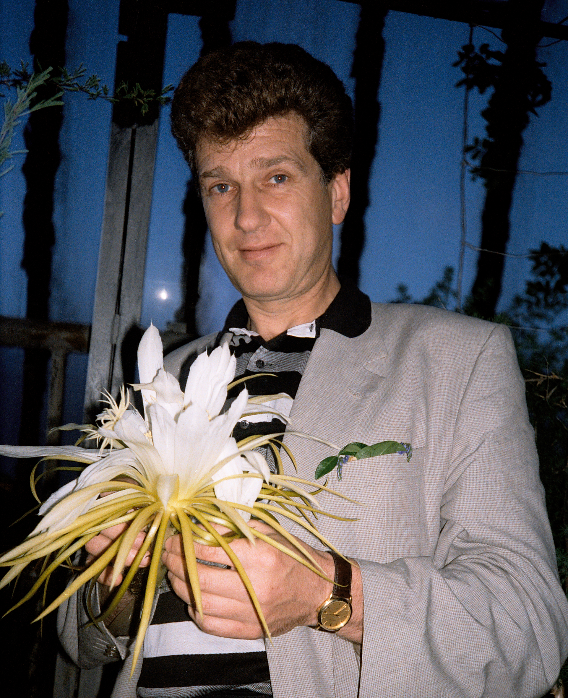 Игорь Матвеевич Костолевский — советский и российский актёр театра и кино, заслуженный артист РСФСР, народный артист Российской Федерации (1995), лауреат Государственной премии России.